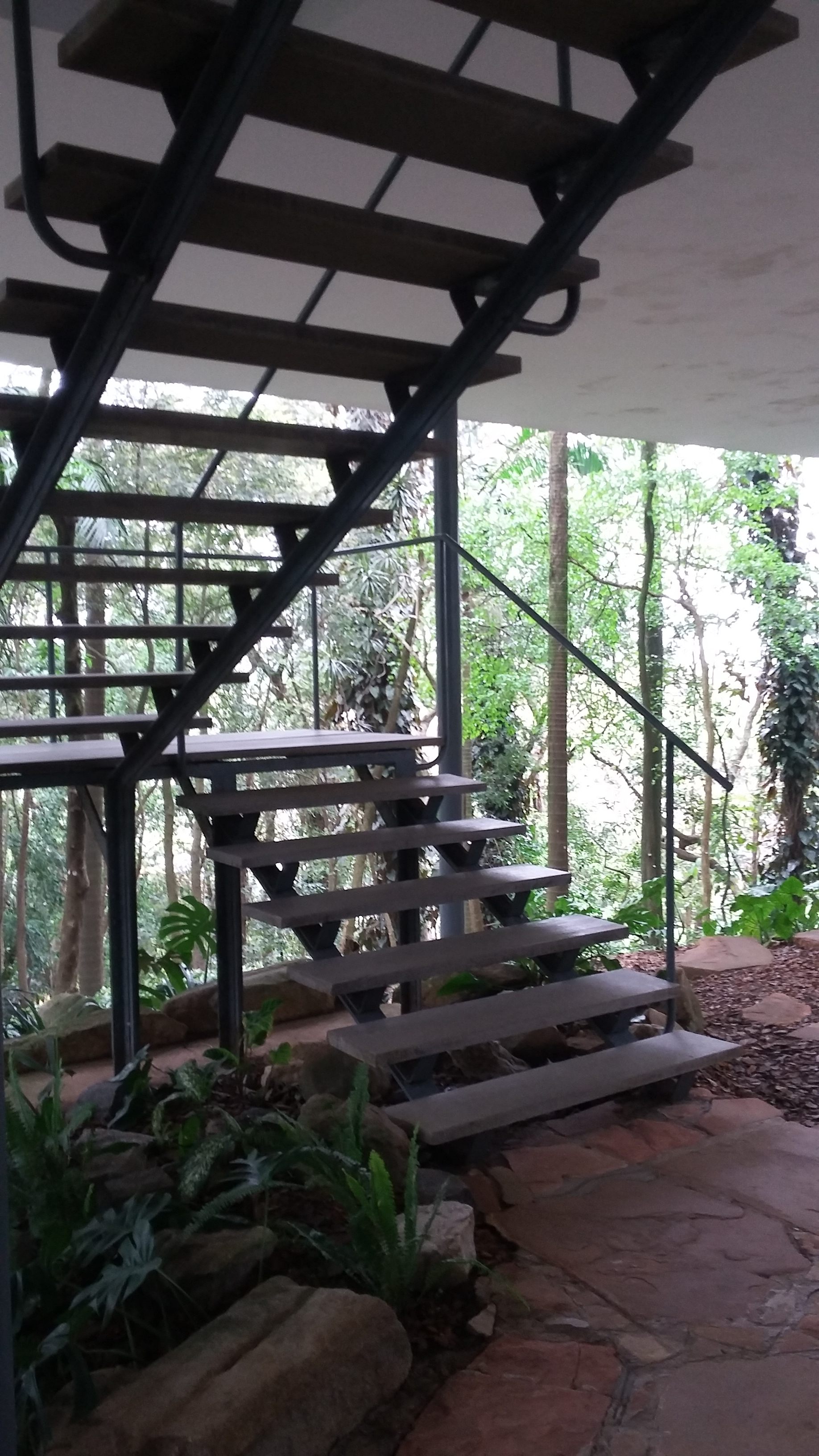 Outro ângulo da escada que dá acesso à entrada principal da Casa de Vidro.